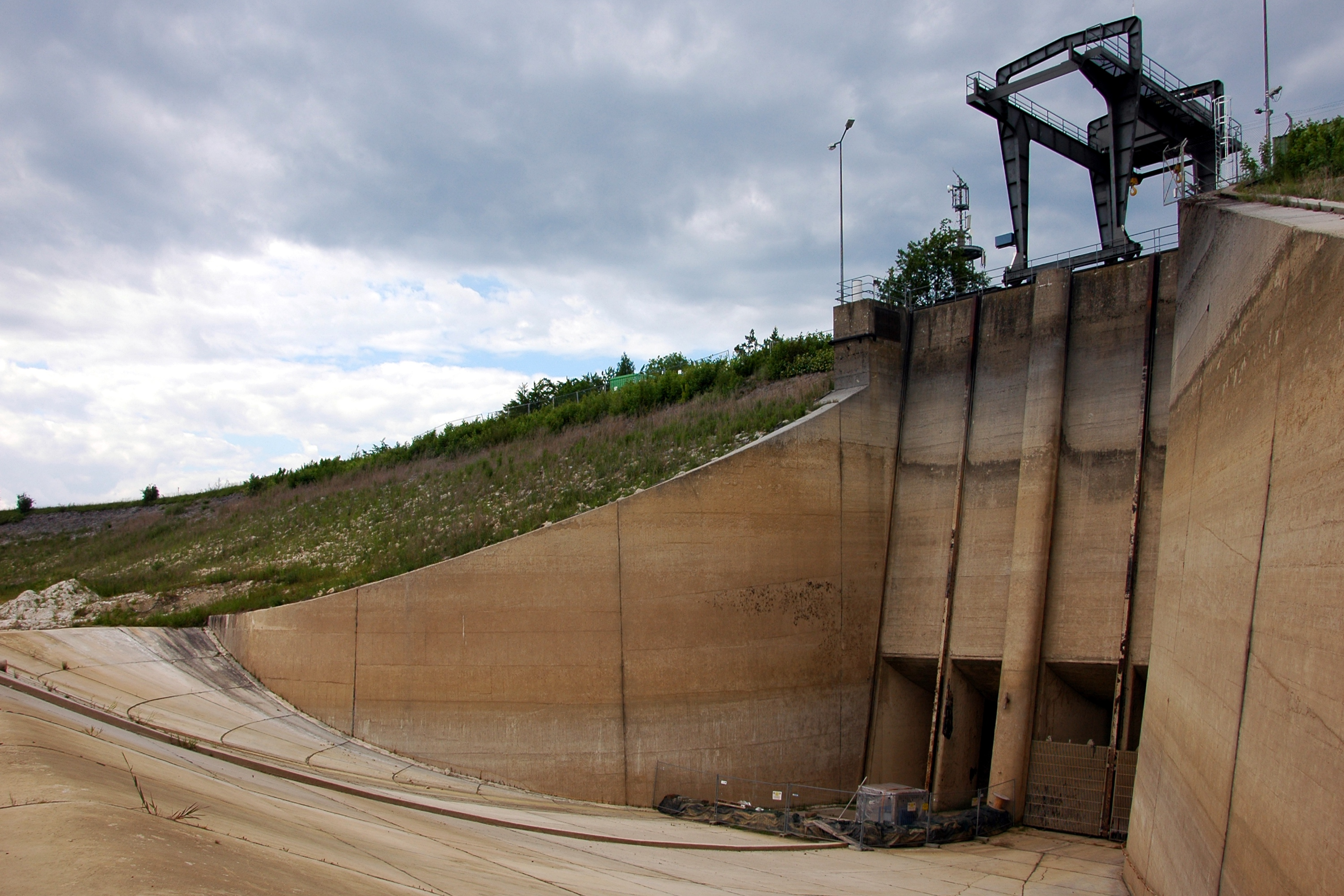 Einlaufbauwerk am Oberbecken des Pumpspeicherkraftwerks Happurg. Auf Grund von Reparaturarbeiten ist das Oberbecken geleert und der Blick frei auf die Einlauftore. Unmittelbar dahinter befinden sich zwei Rohrleitungen, die etwa 200 m im Berg senkrecht nach unten führen, bevor sie dann mit schrägem Neigungswinkel weiter zum Kraftwerk verlaufen.